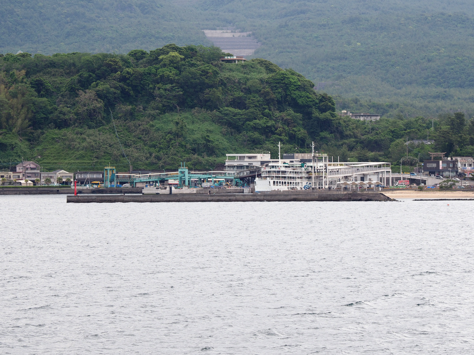 鹿児島県鹿児島市桜島の桜島港